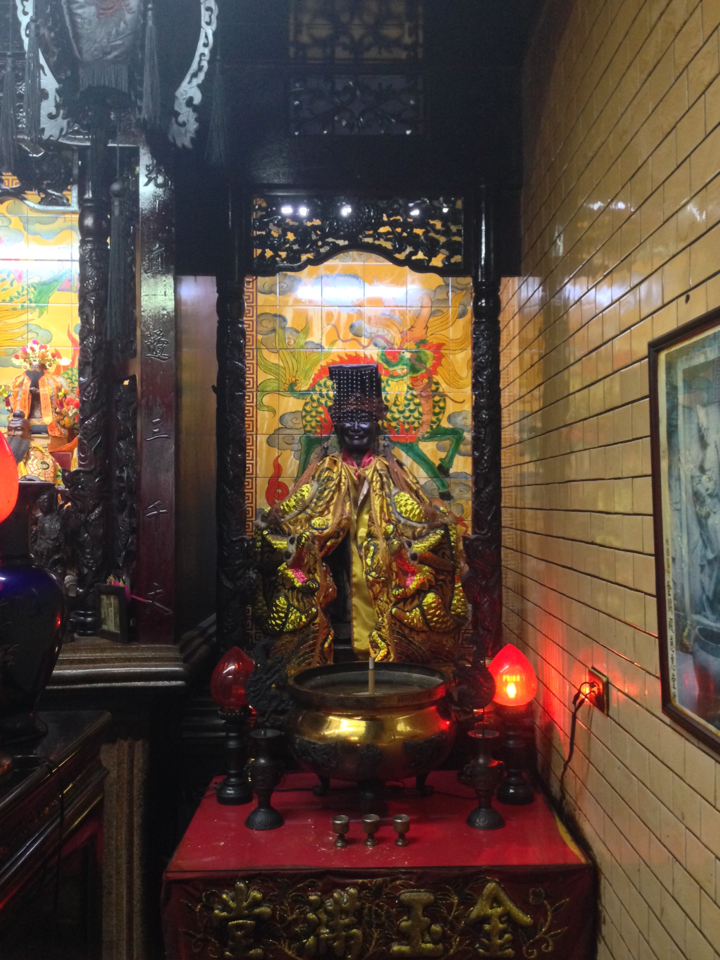 魁星宮蔣公神像